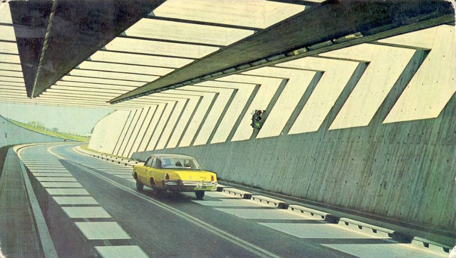 Salida del túnel subfluvial Hernandarias, hoy llamado «Raúl Uranga – Carlos Sylvestre Begnis», conecta la ciudad de Paraná con la de Santa Fe, en Argentina.